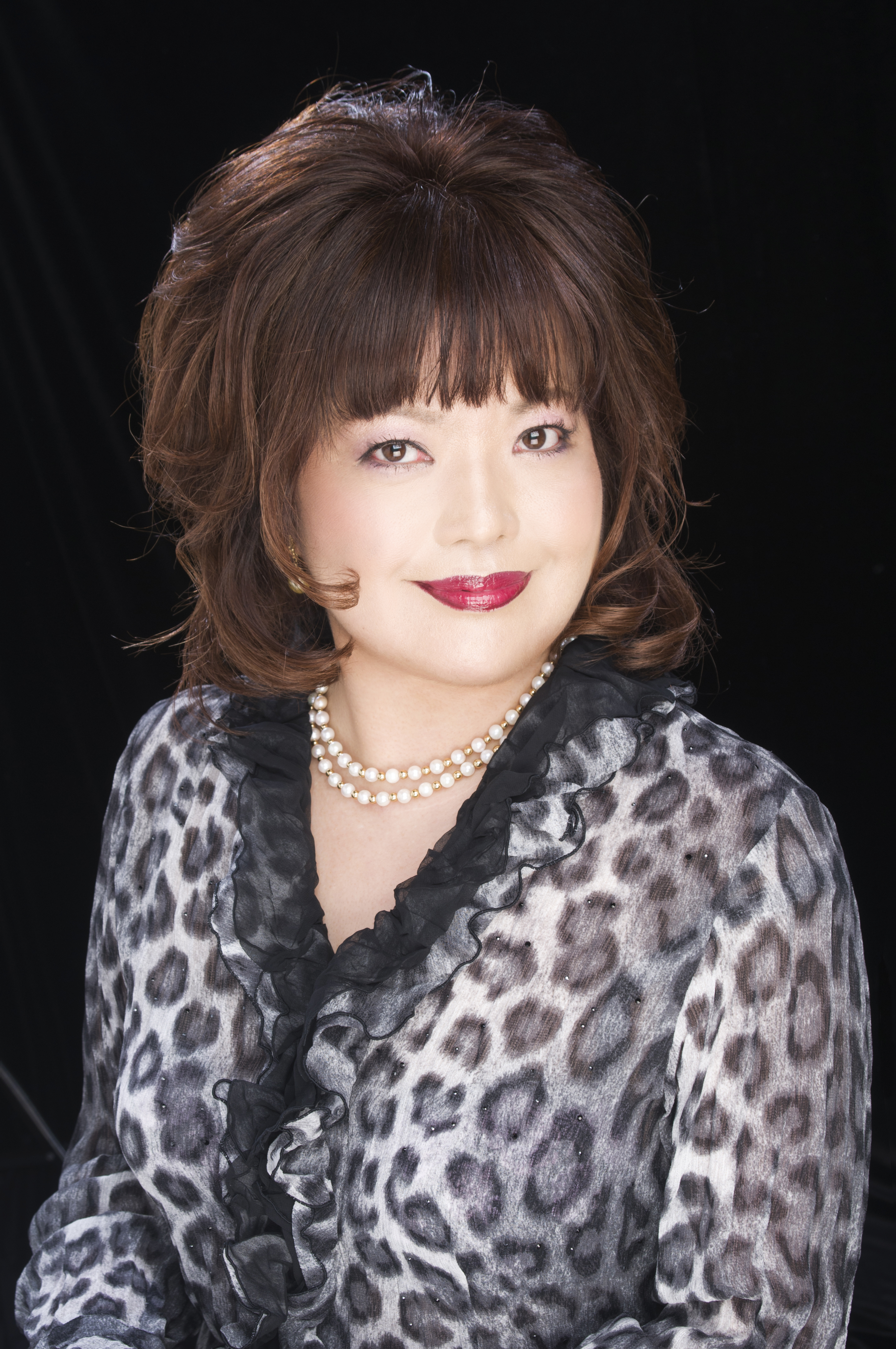 2013年現在の本人写真